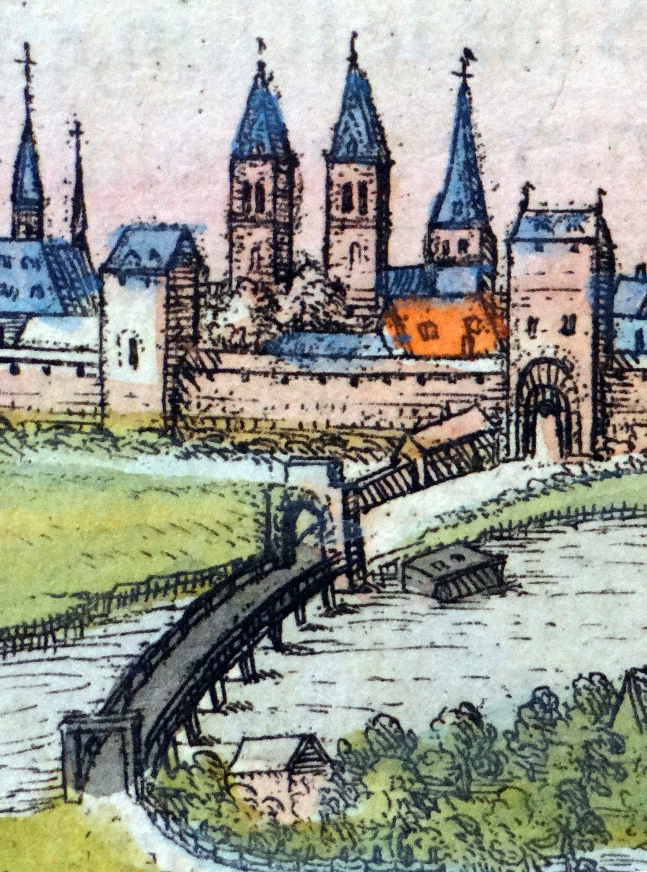 Torturm mit vorgelagerter Woogbrücke, Worms. Detail aus: Georg Braun, Simon Novellanus und Franz Hogenberg: Beschreibung und Contrafactur der vornembster Stät der Welt. Heinrich von Ach, Köln 1574. Tafel zwischen den Seiten 35 und 36. Stadtarchiv Worms: Abt. 214 Nr. 1499.